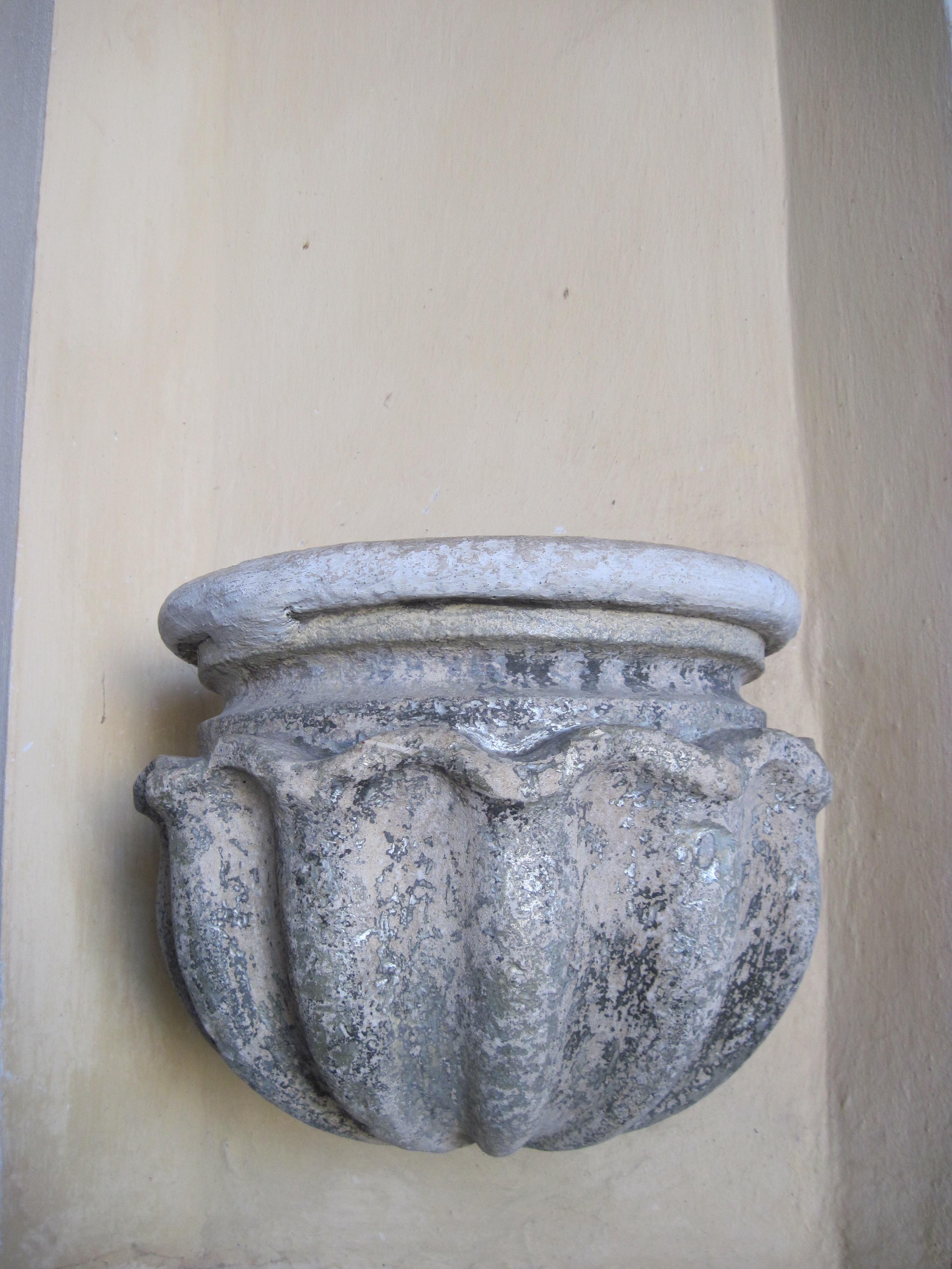 Умивальниця. Костел Внебовзяття, Бучач. осінь 2013